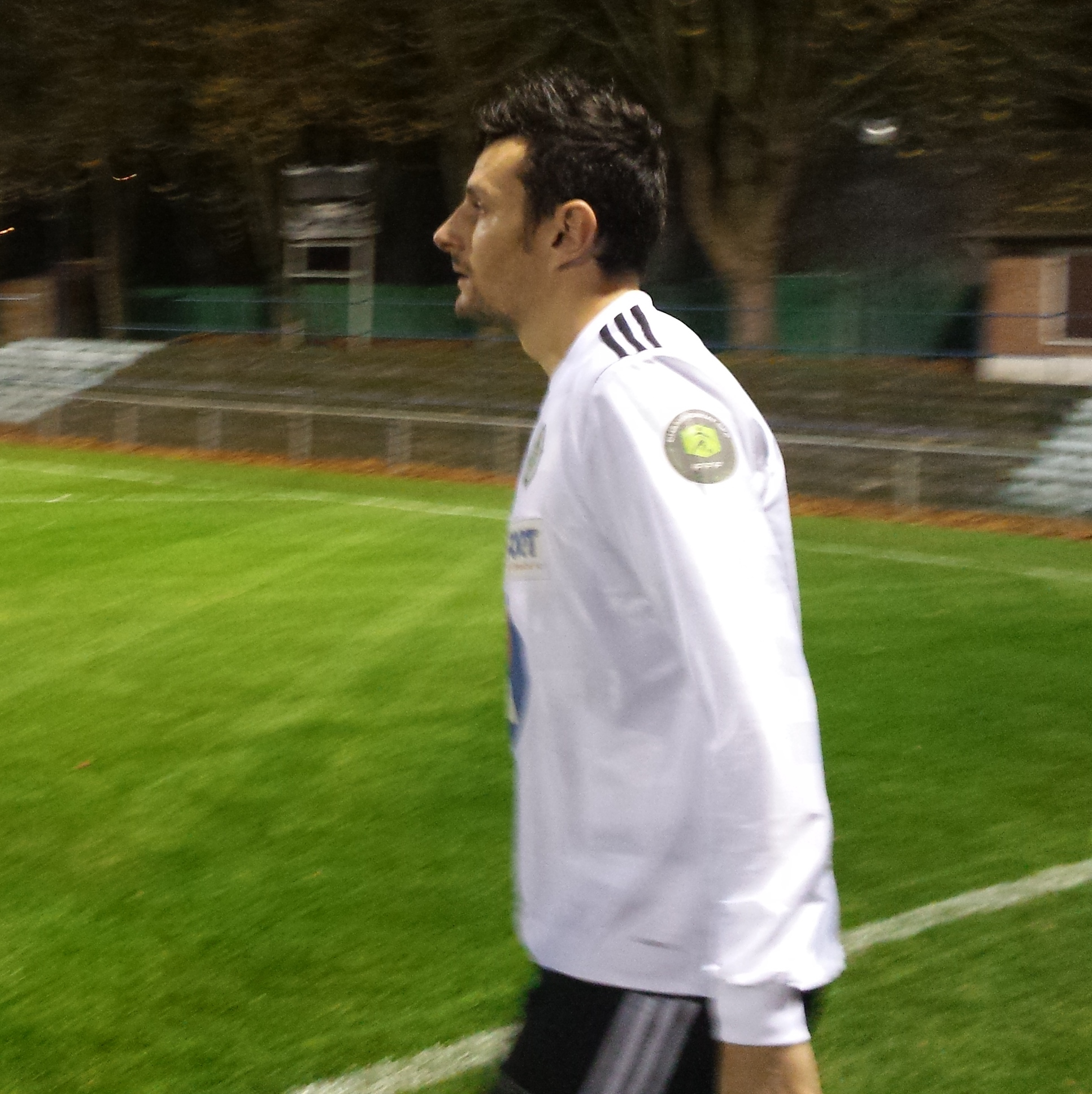 Rémy Souyeux (au centre) lors de l'entrée des joueurs de Romorantin pour le match Lens B - Romorantin, au Stade François Blin d'Avion, comptant pour la onzième journée de CFA Groupe A (Quatrième division française) de football.